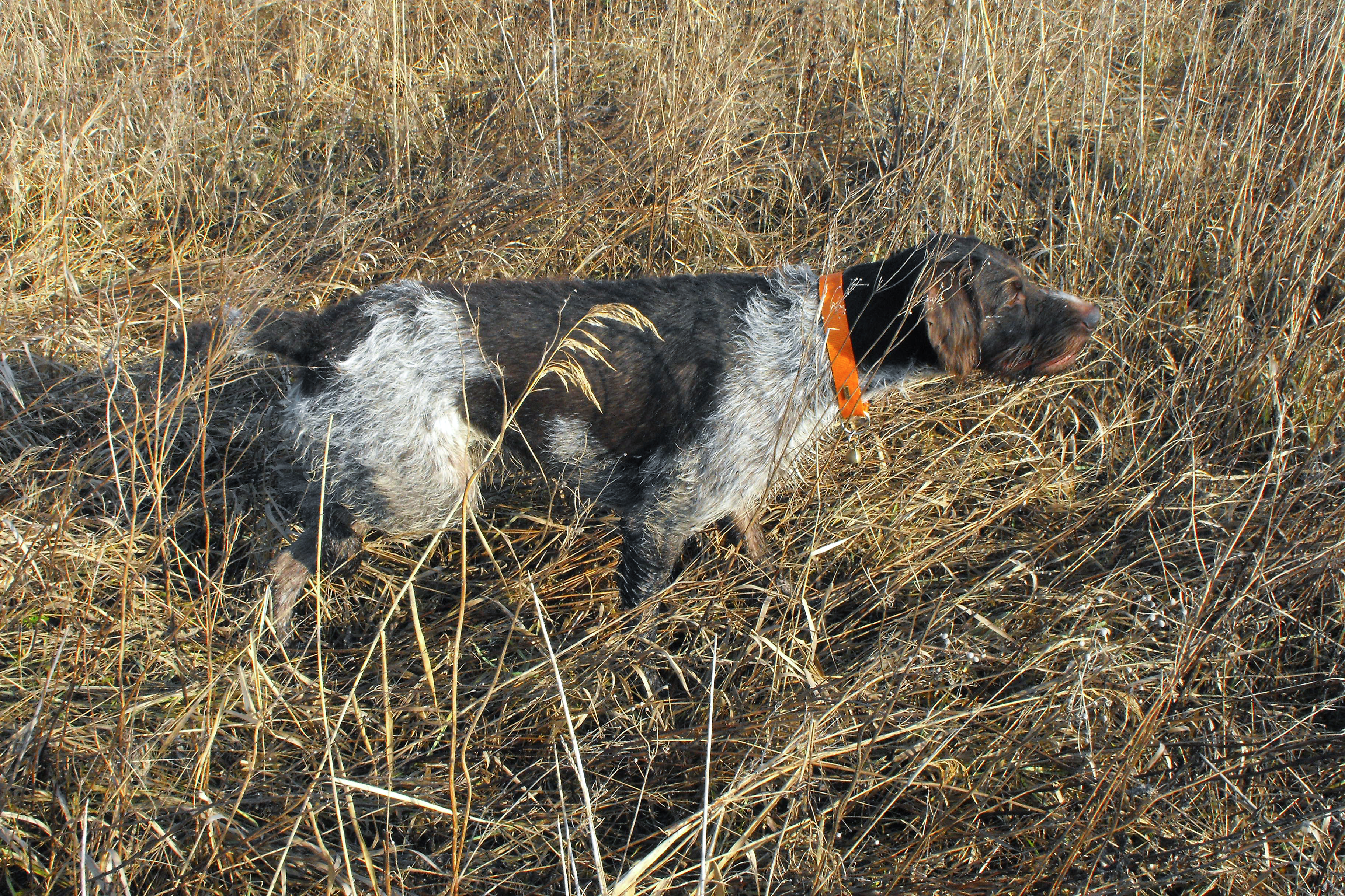 Tas nevű drótszőrű német vizslám fácánkakast áll (Marosvásárhely)